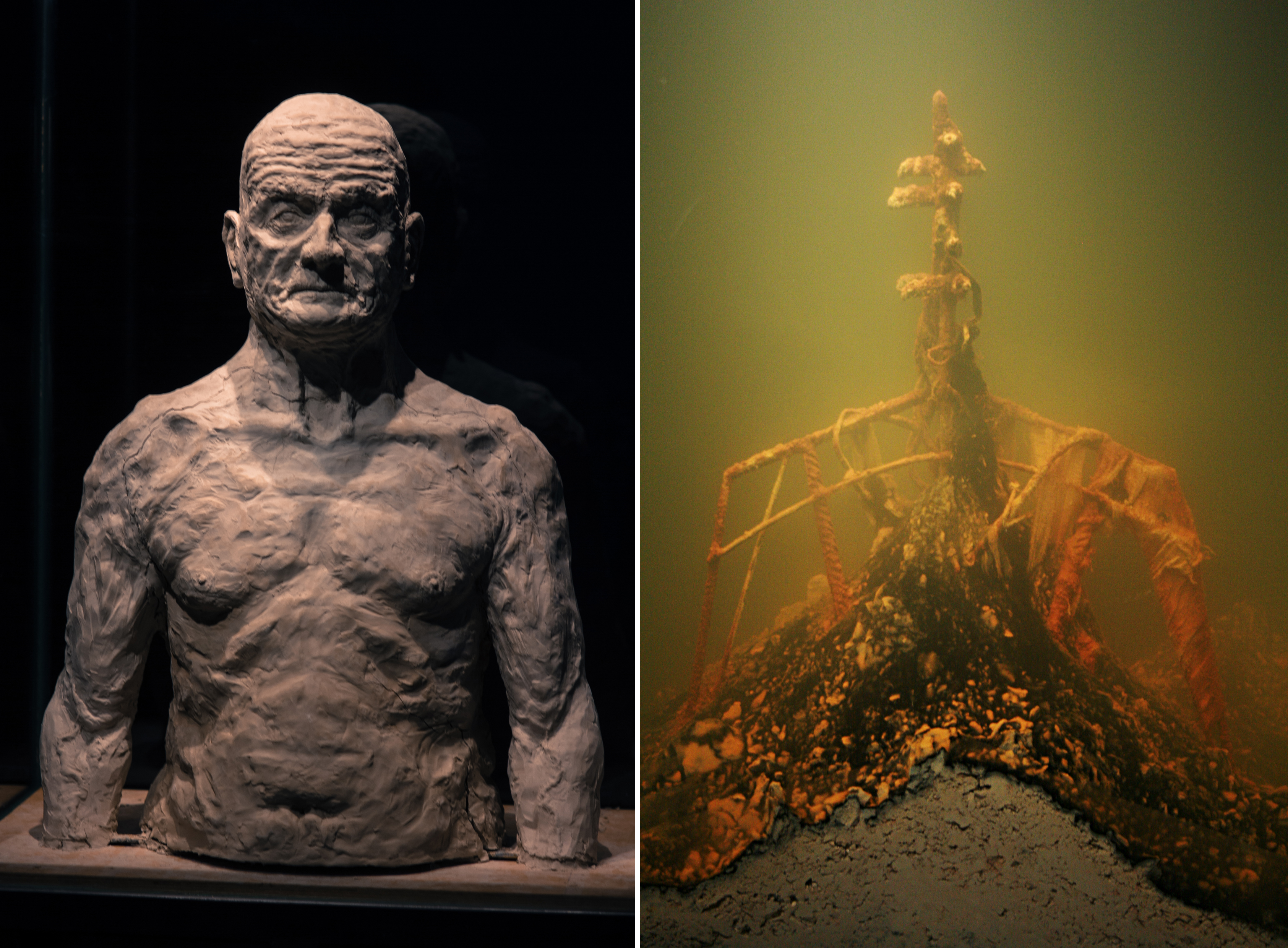 The measure of a man